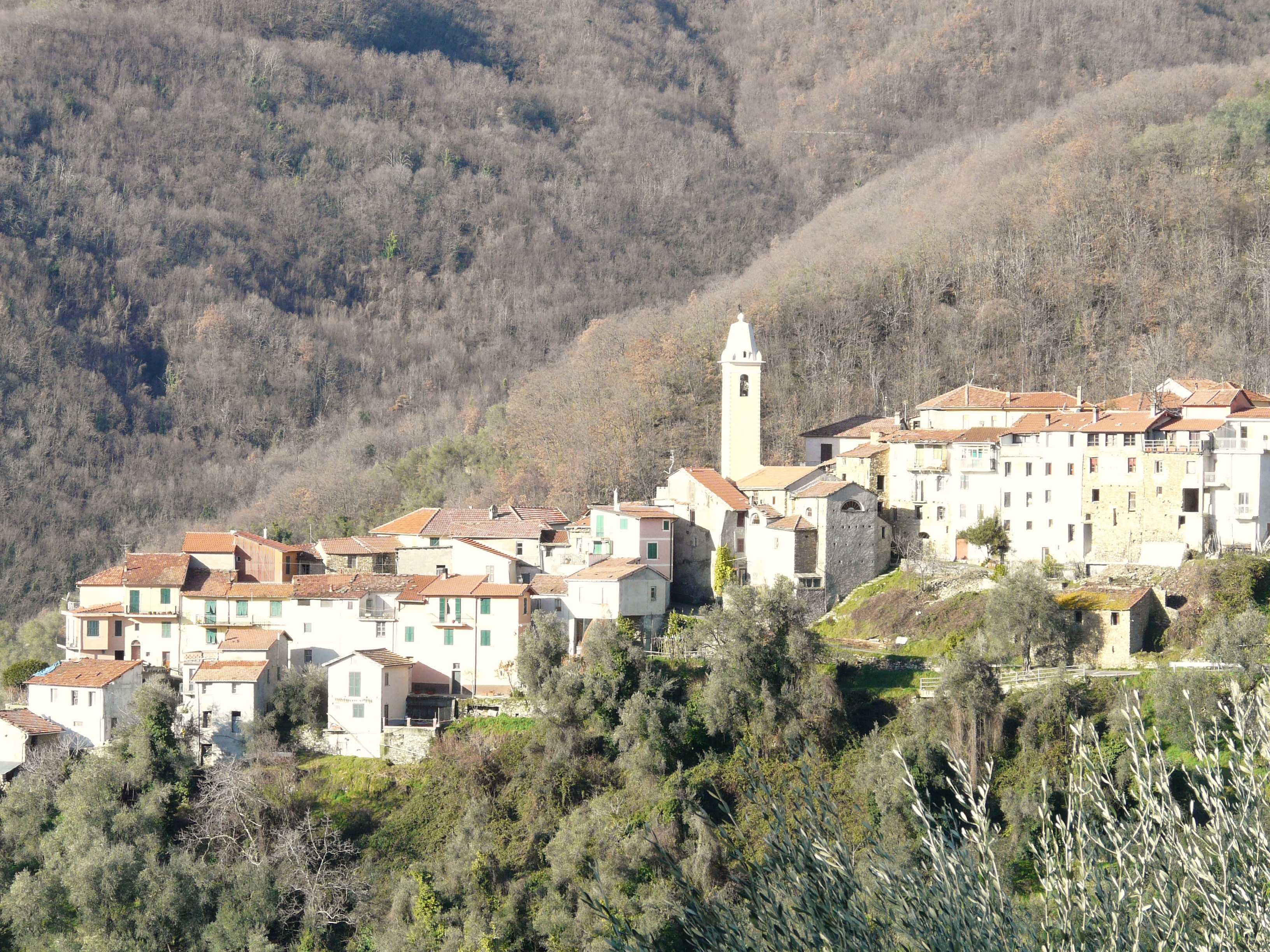 Frazione Vellego, Casanova Lerrone, Liguria, Italia